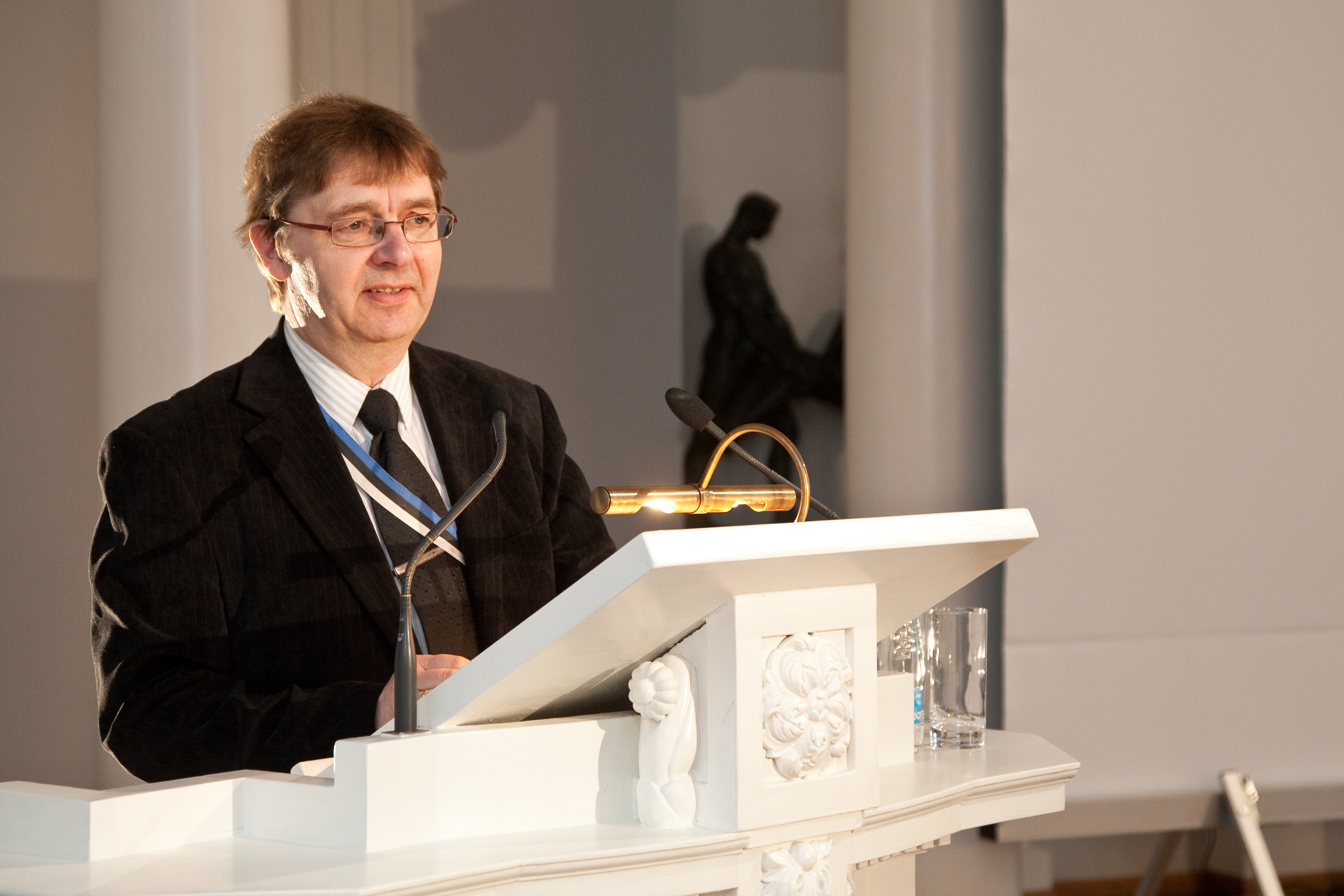 Eesti Üliõpilaste Seltsi 140. sünnipäeva tähistamine. 7. aprillil 2010 pidas TÜ aulas TÜ üldajaloo õppetooli uusaja professor vil! Mati Laur akadeemilise loengu teemal "Miks Venemaa on just selline?".